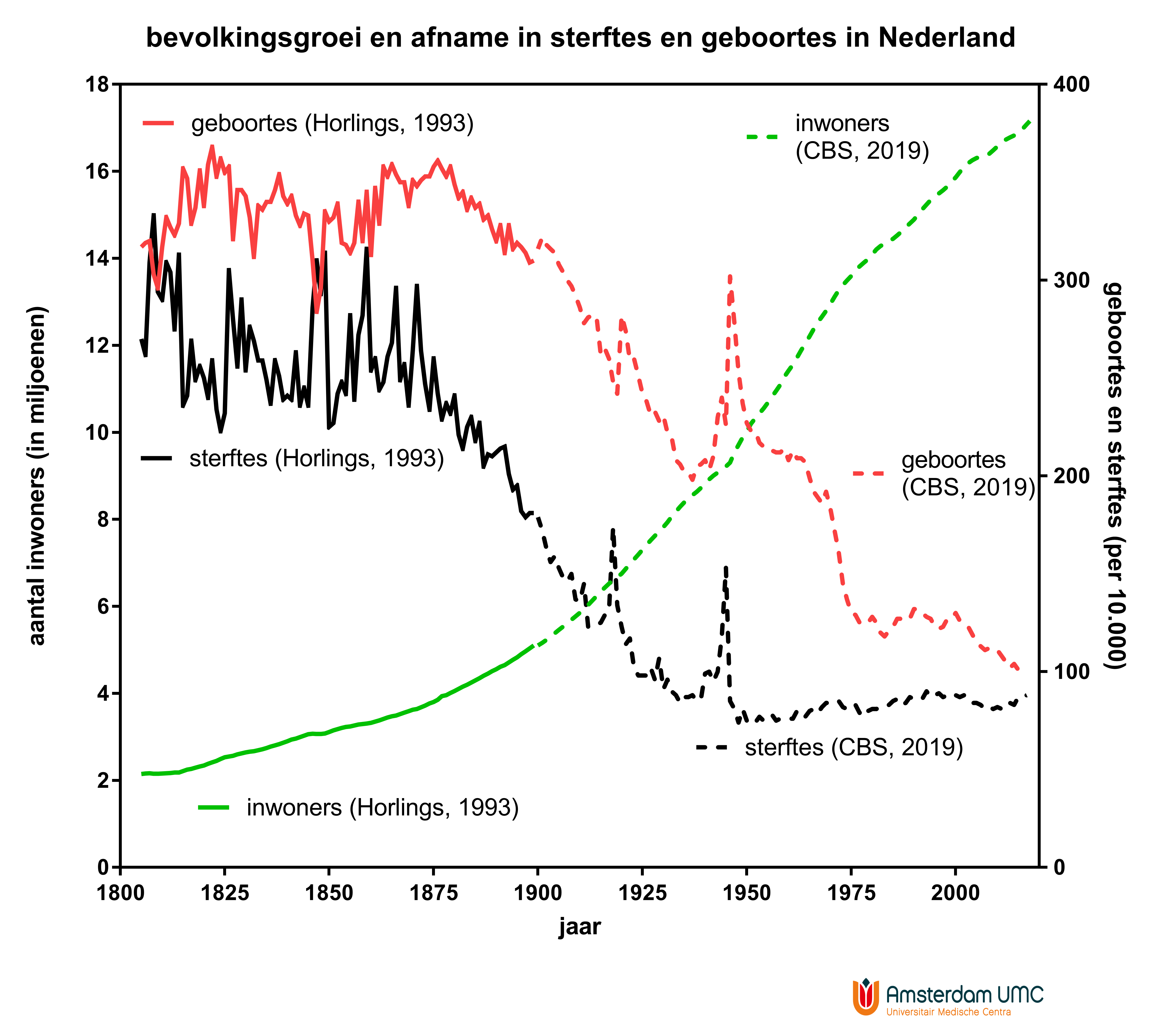 Historische ontwikkeling van geboorte sterfte en bevolking in Nederland 1807 t/m 2018